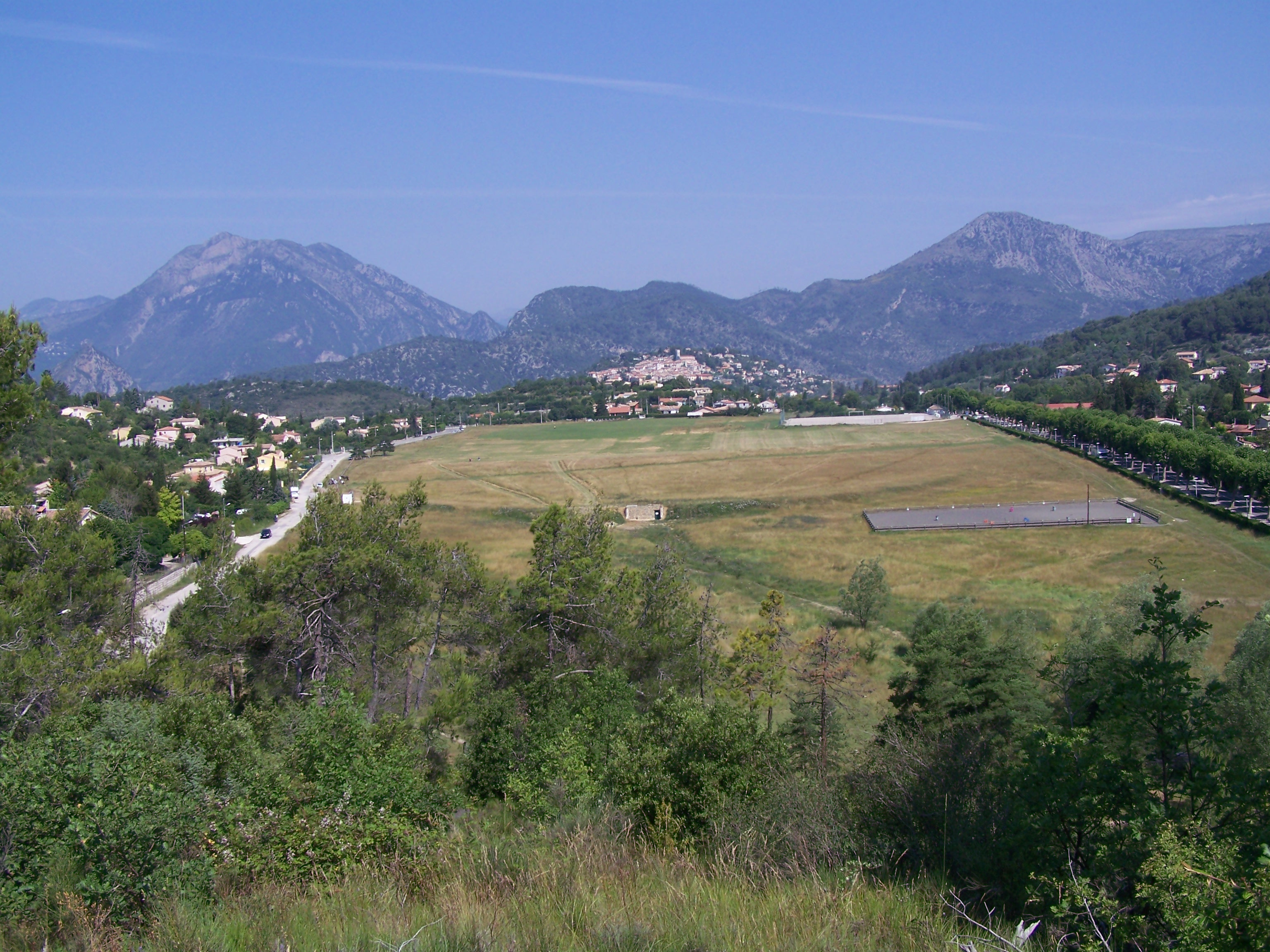 Les "grands prés" au sud du village de Levens (Alpes-Maritimes, France), avec à droite la route départementale n°19 et au fond les monts Vial (1551m à gauche), Clau (828m au milieu) et Collet d'Huesti (1164m à droite).